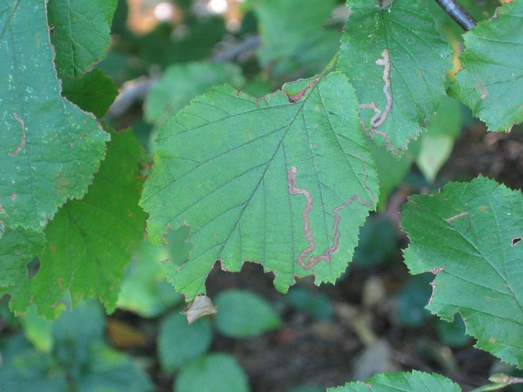 Mine von Stigmella floslactella